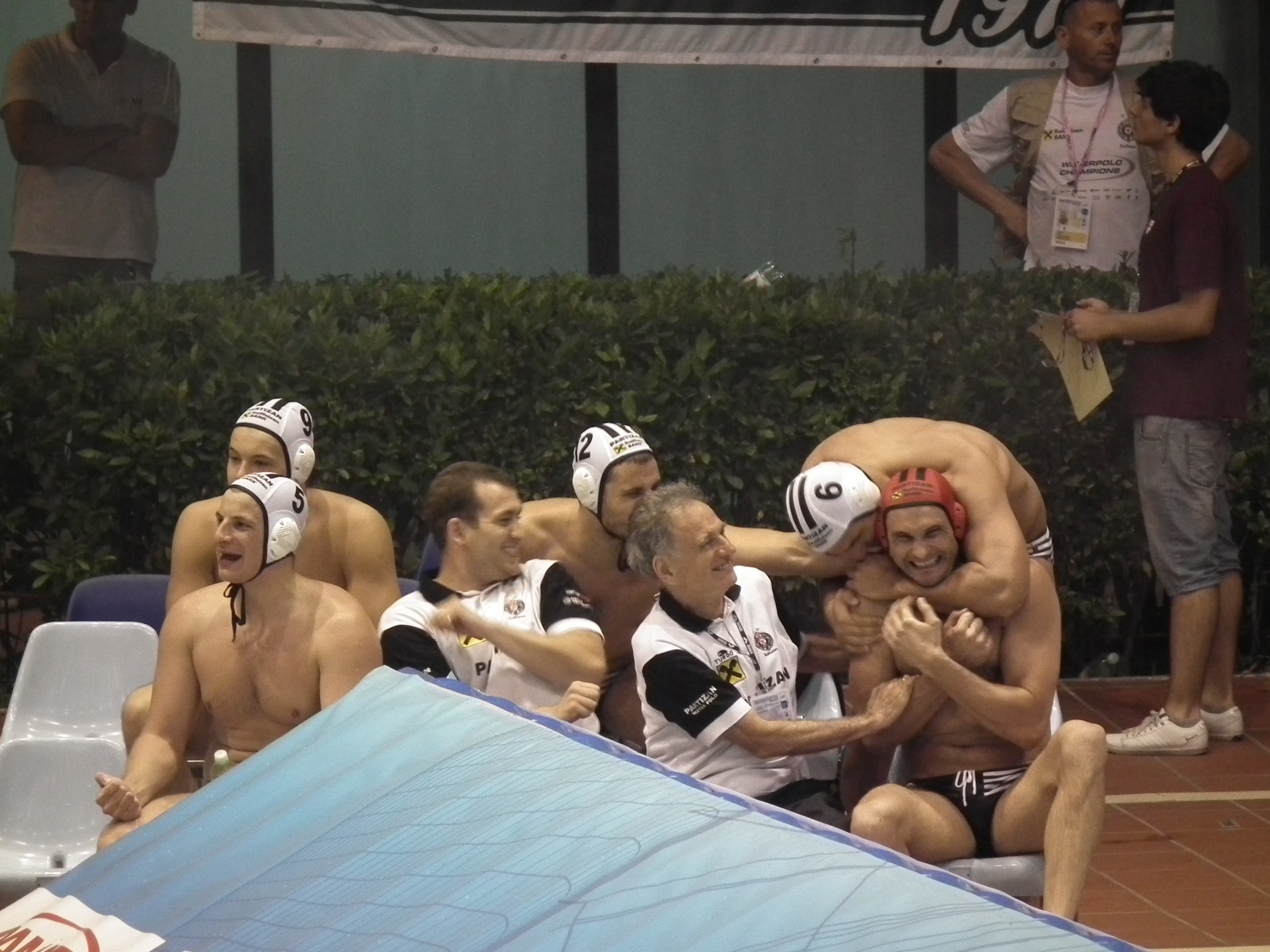 Milan Aleksić (n. 5), Dušan Mandić (n. 9), Miloš Ćuk (n.12), Duško Pijetlović (n. 6) and Slobodan Soro (red cap, goalkeeper)